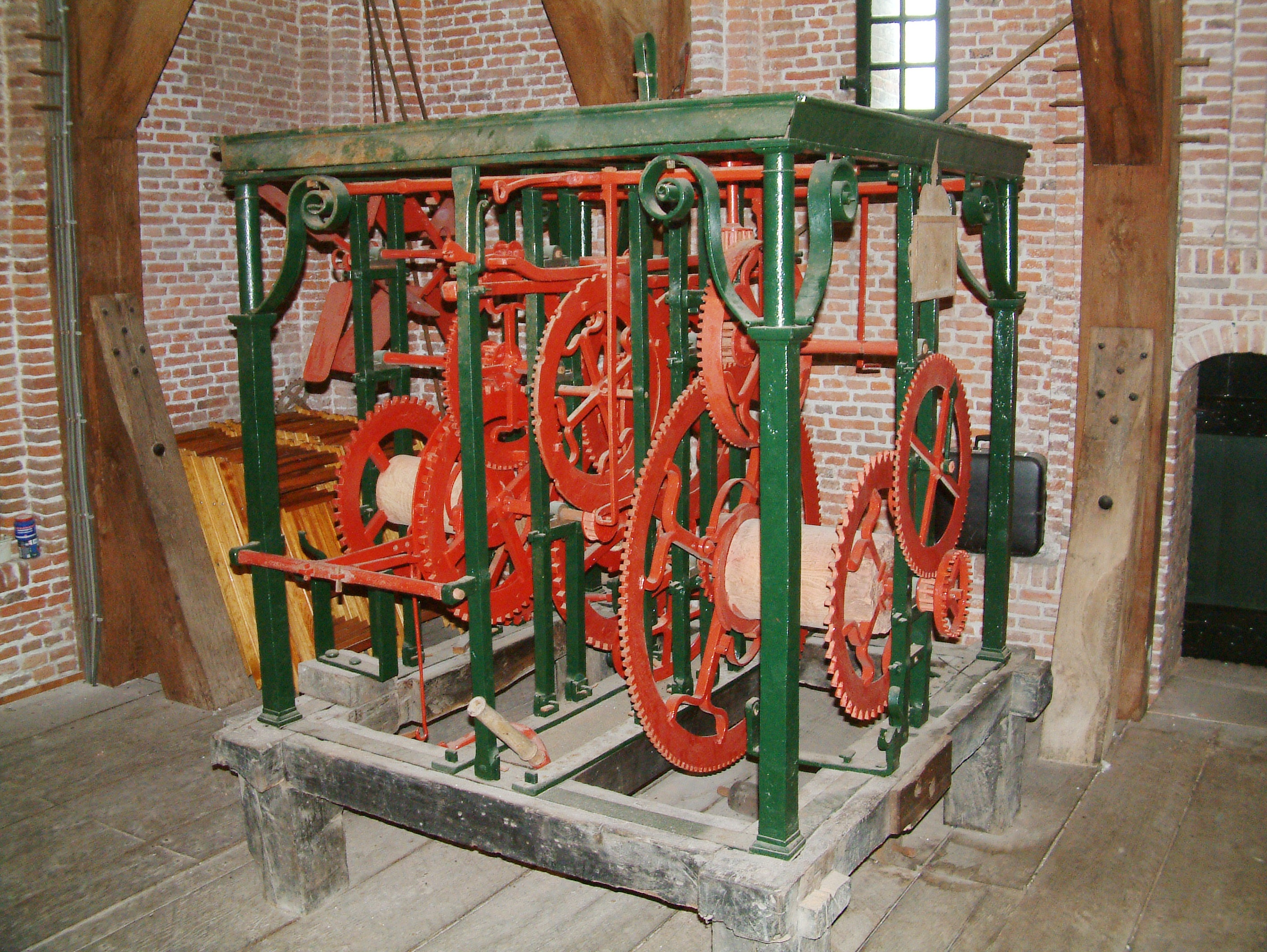 Oude kerk Zoetermeer